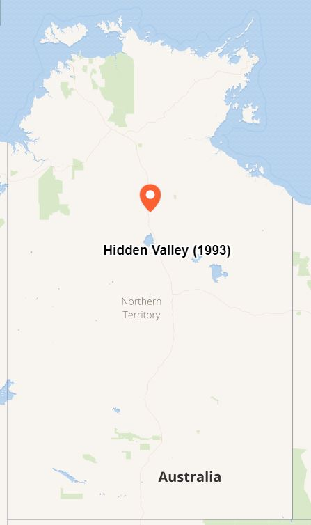 'ndranghetanei territori settentrionali